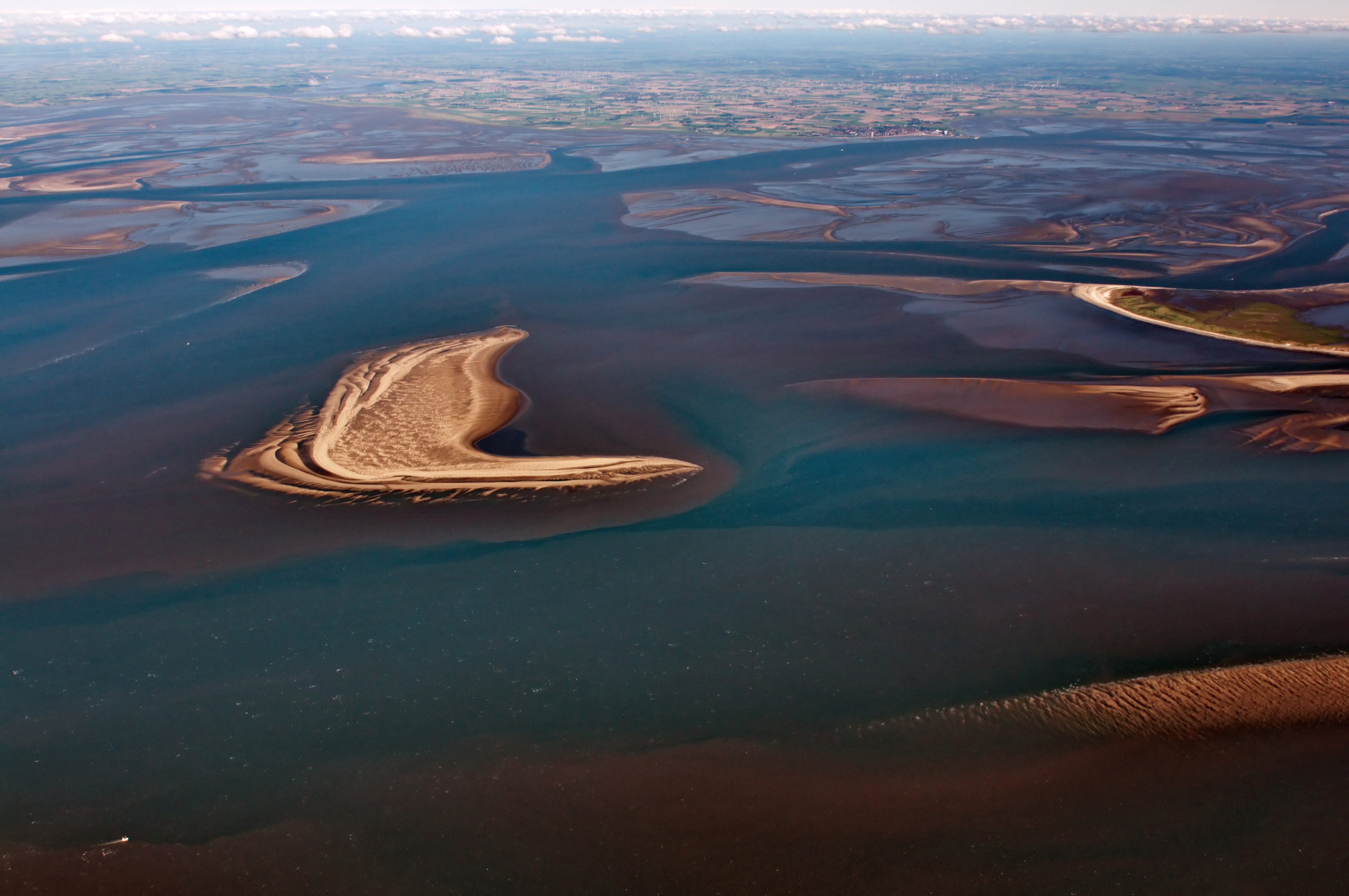 Fotoflug über das nordfriesische Wattenmeer - Tertius (von SW), rechts Trischen, im Hintergrund Norderdithmarschen